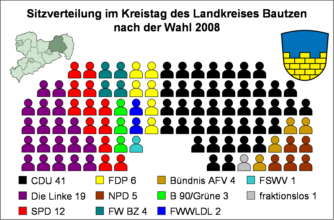 Sitzverteilung im Kreistag des Landkreises Bautzen nach der Wahl vom 8. Juni 2008 Hornjoserbsce: Rozdźělenje sydłow w Budyskim wokrjesnym sejmiku po wólbach 8. smažnika 2008